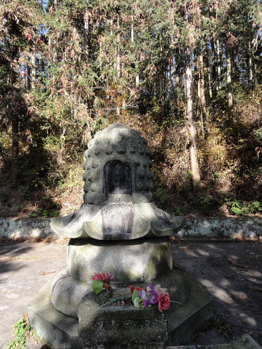 dao-ying-chan-shi-ta